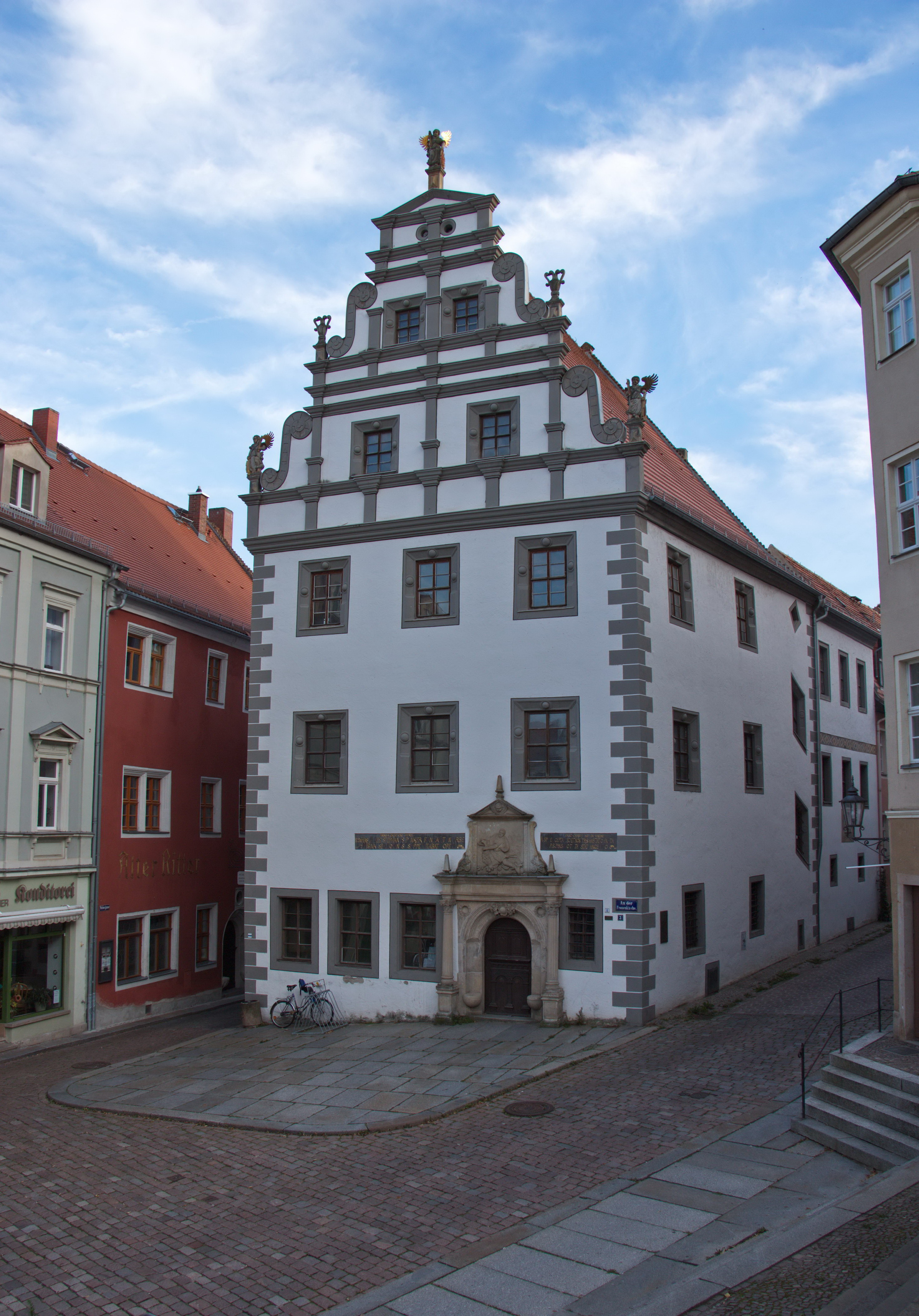 Meißen, an der Frauenkirche 3, altes Brauhaus